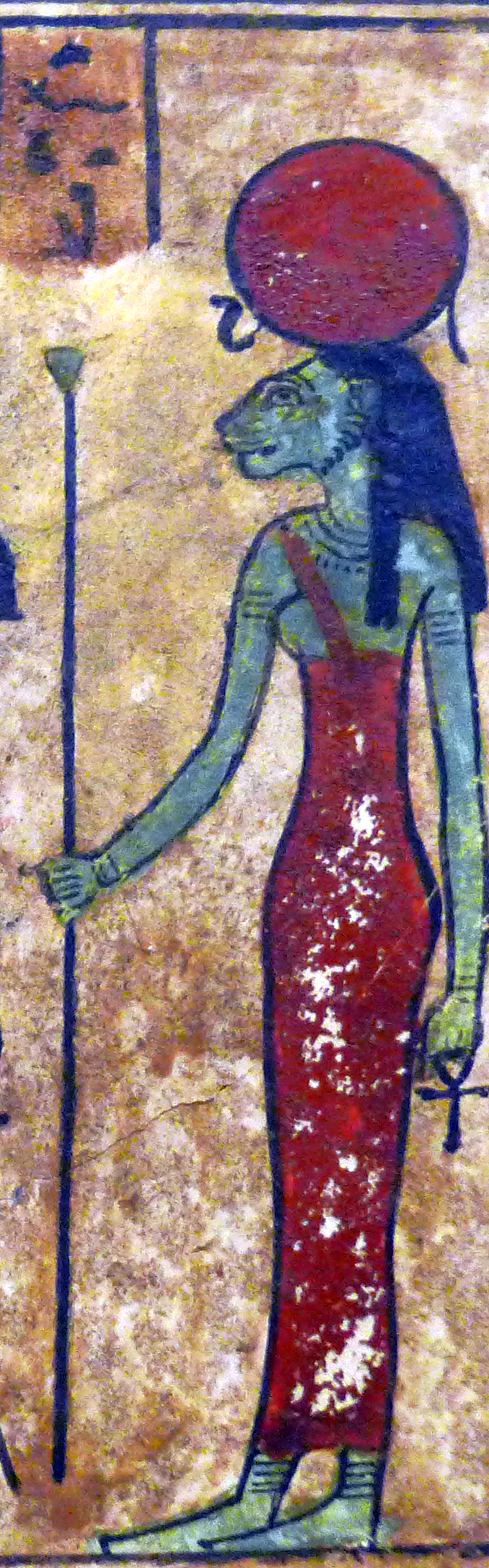 Détail de l'image centrale gauche : Tefnout.